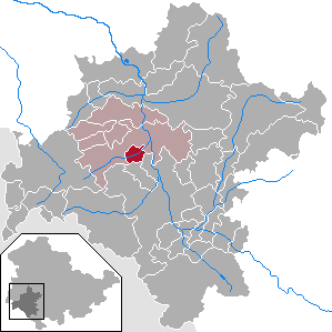 Mehmels in Thuringia - District Schmalkalden-Meiningen